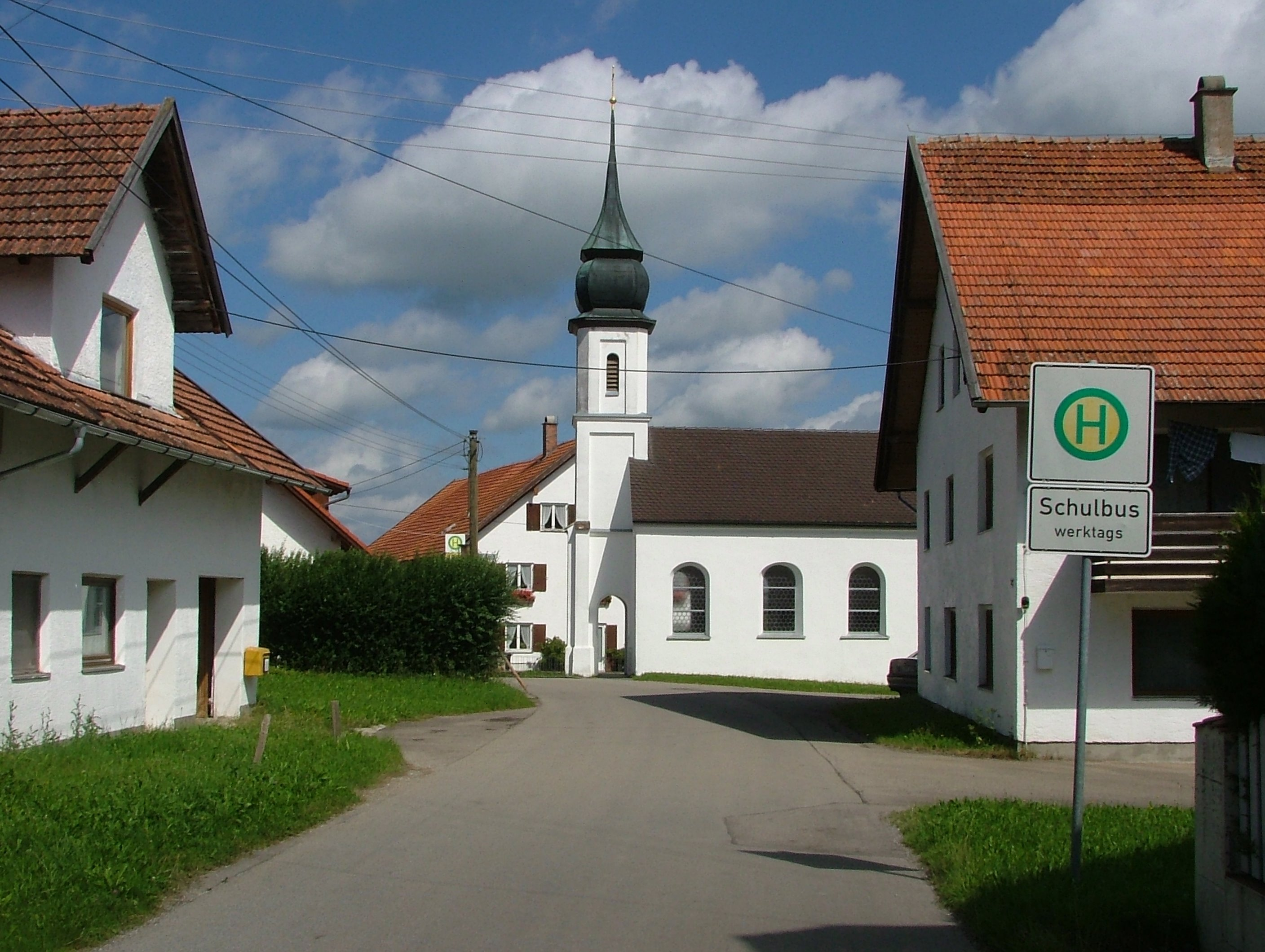 Hofs